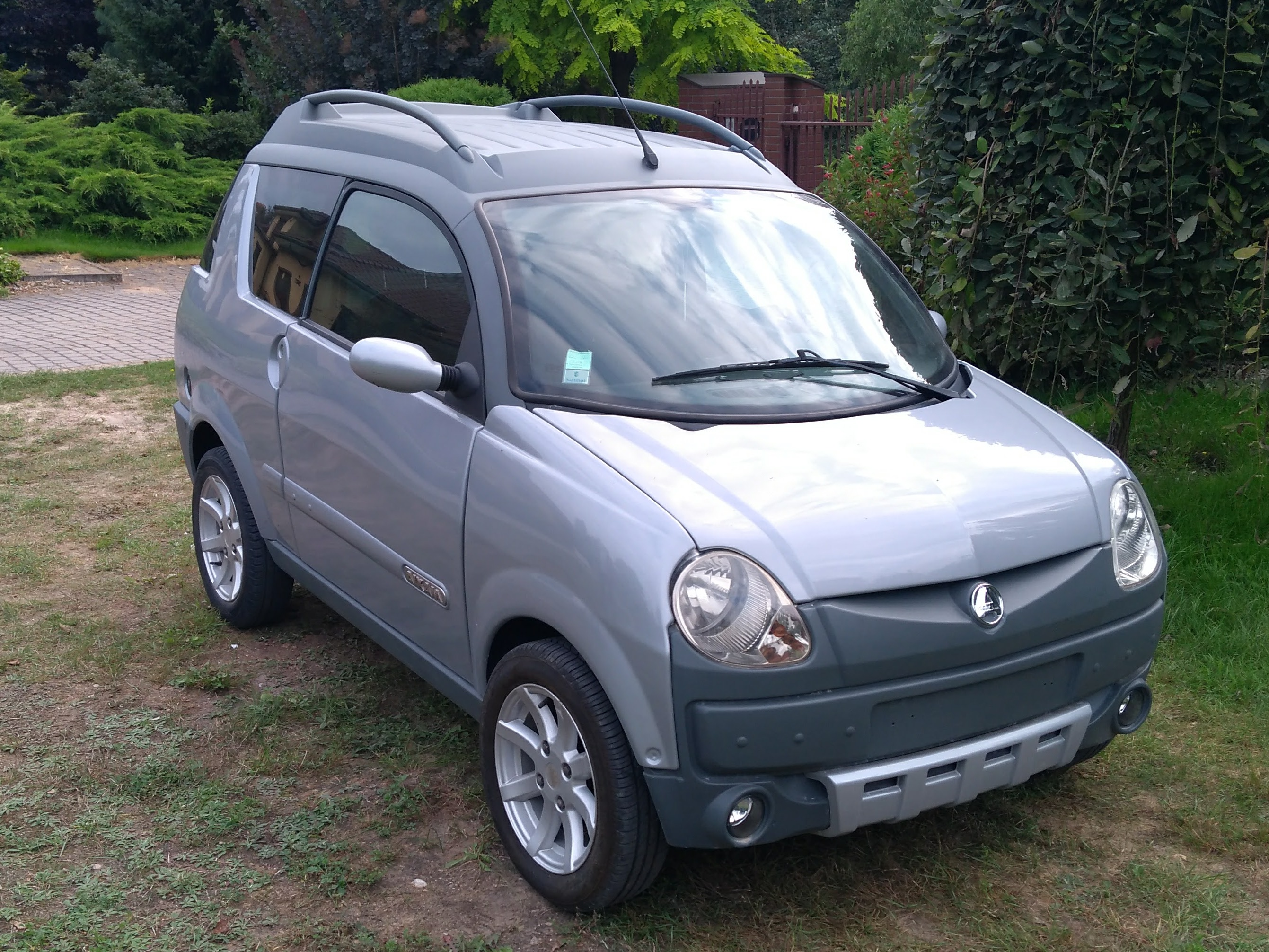 Model Crossline 2007